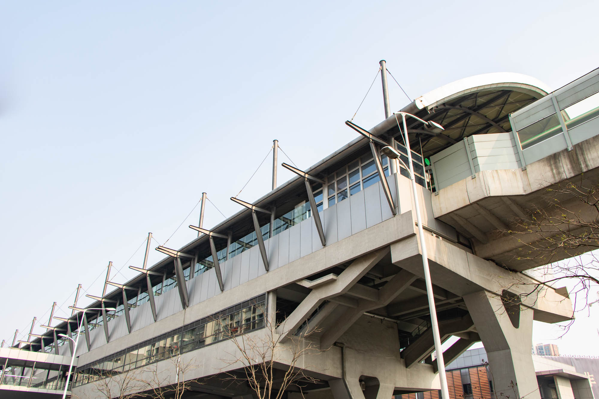 中文（中国大陆）: 无锡轨道交通2号线庄桥站